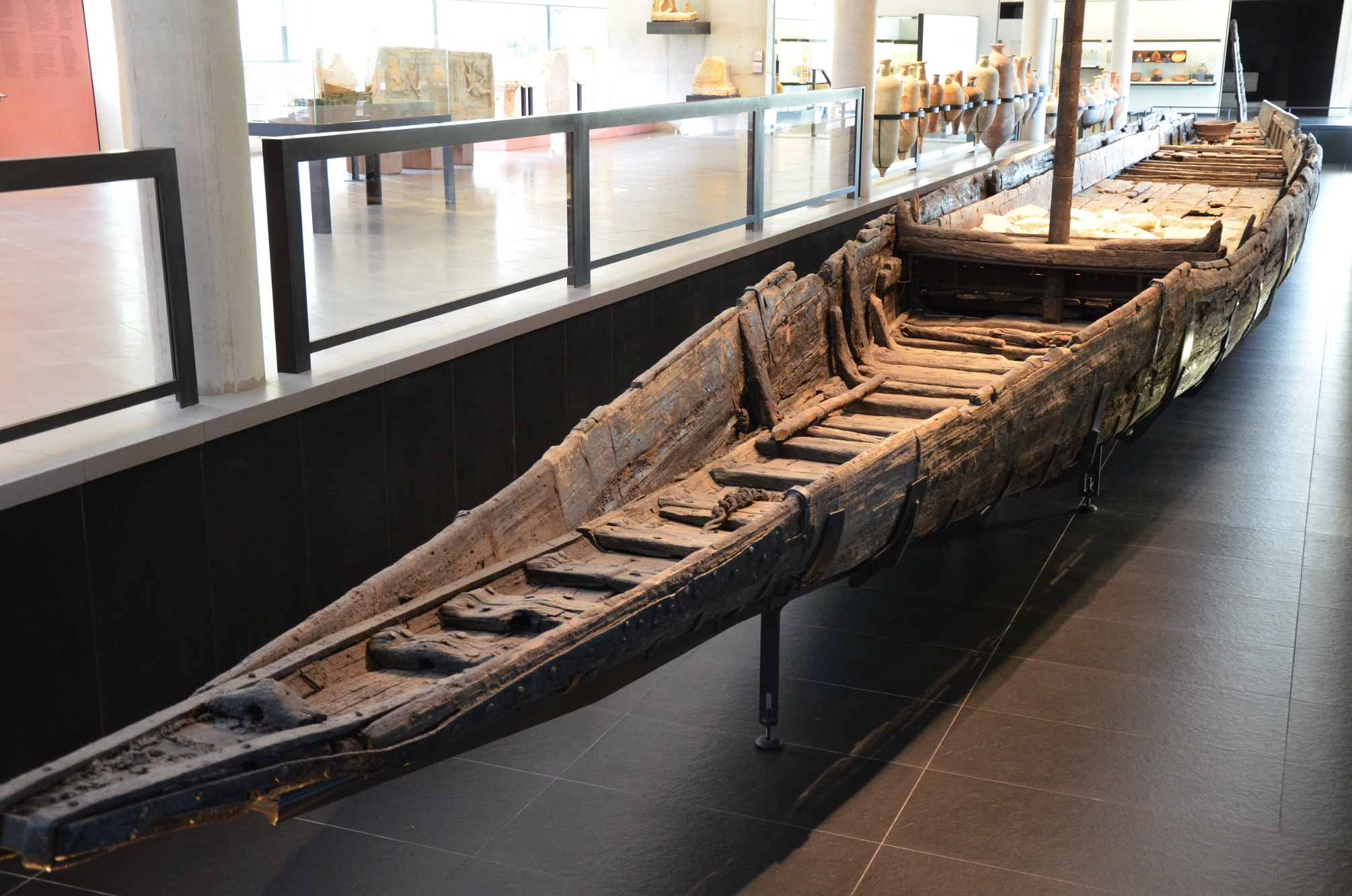 Musée de l'Arles antique, Arles, France